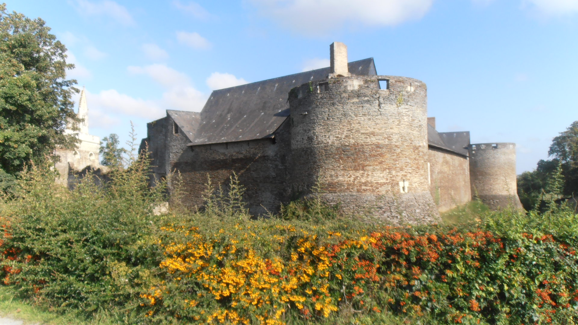 Une partie du château du Plessis-Macé (Maine-et-Loire, France) vue depuis le village.